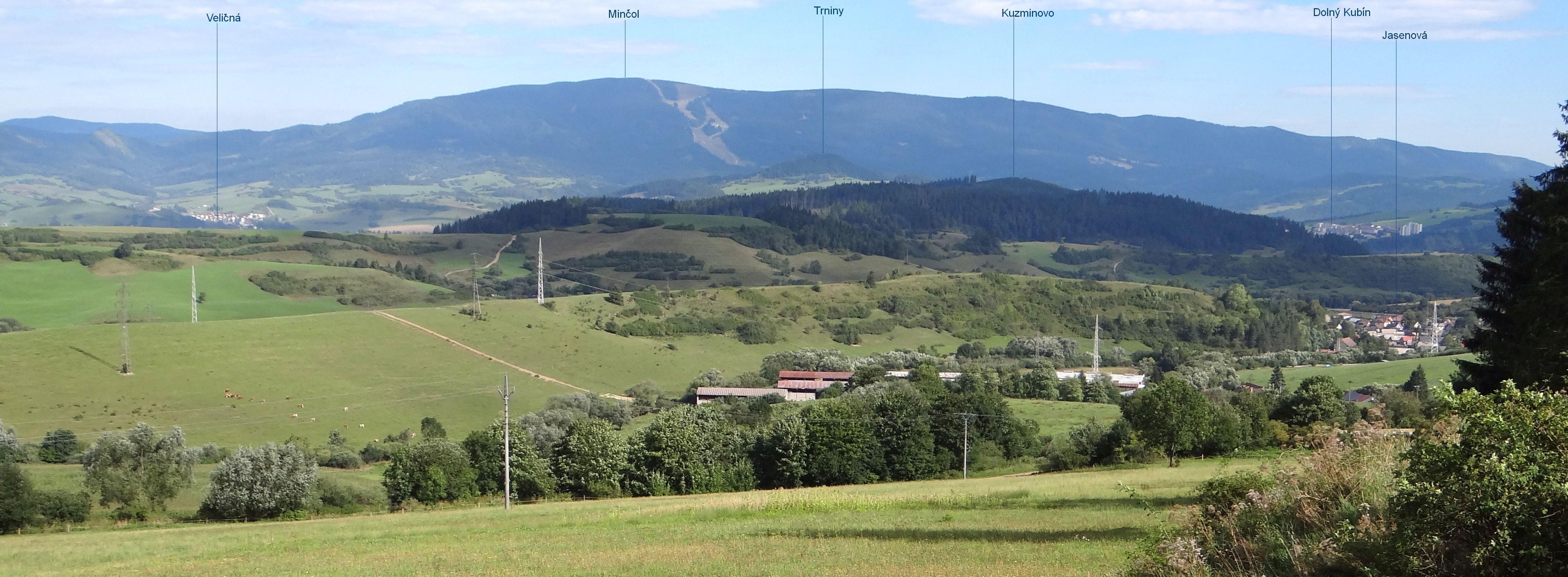 Widok z parkingu między wsiami Jasenova i Valaska Dubova